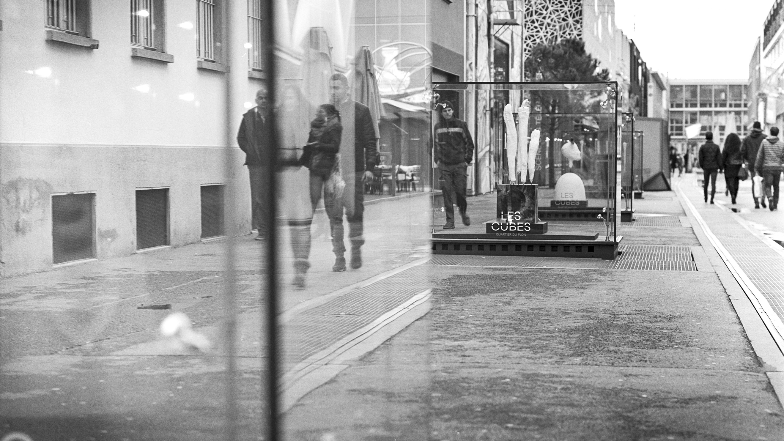 5 cubes en verres le long de la Voie-du-Chariot